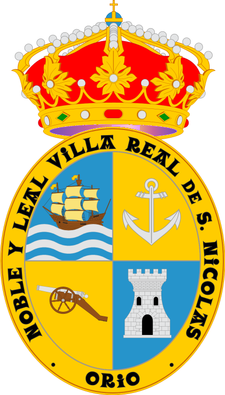 Gipuzkoako Orio hiribilduaren armarria